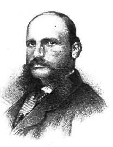 Griechischer Politiker, 19. Jahrhundert